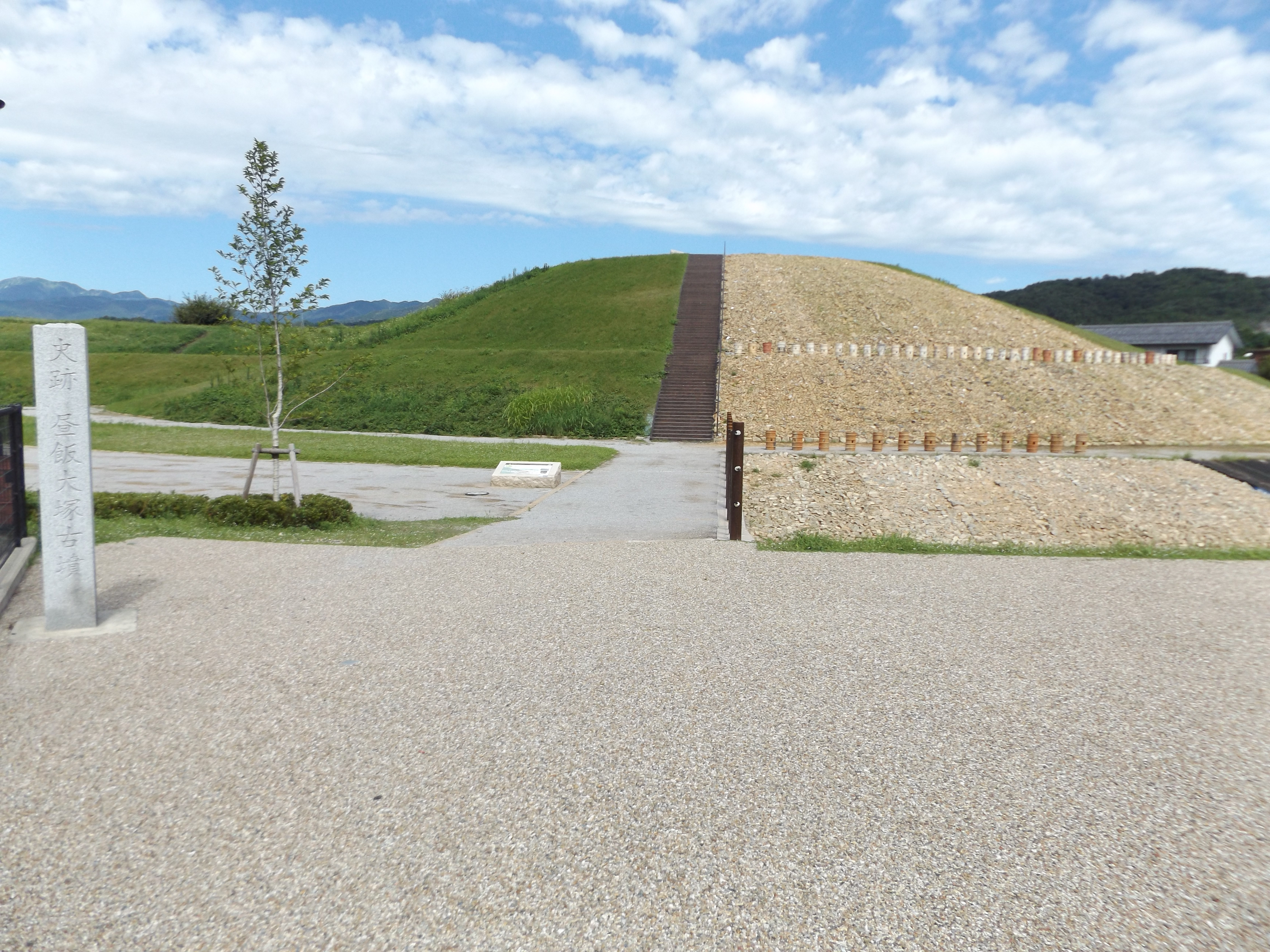 岐阜県大垣市昼飯町にある昼飯大塚古墳の後円部。 右側の草が生えていない部分は「復元ゾーン」として、葺石や埴輪を並べて古墳がつくられた当時の姿を再現している。